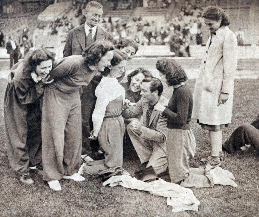 Marcel Cerdan, champion d'Europe, signant à ses admiratrices des autographes à Colombes, en juin 1939.